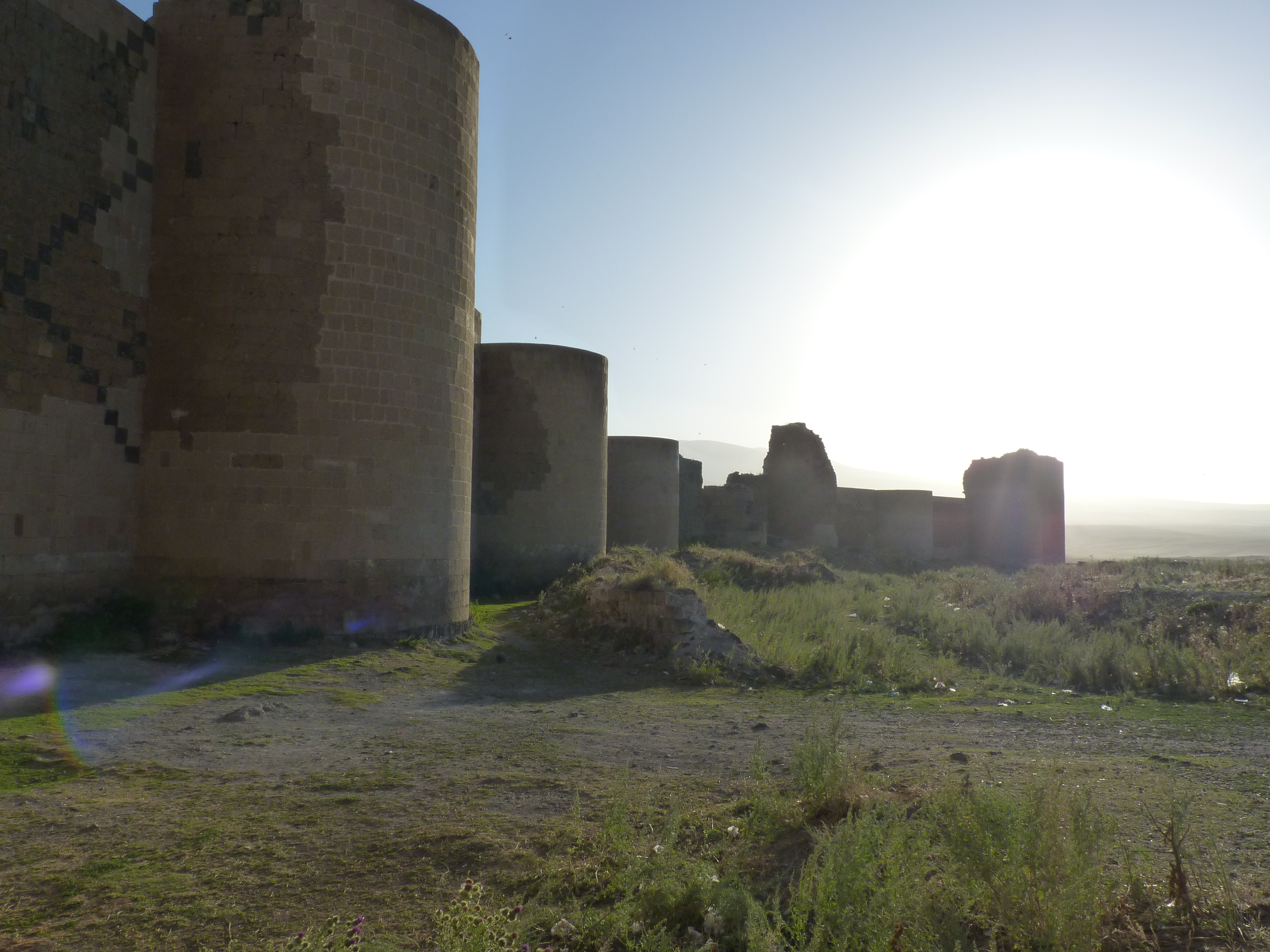 Mury Ani widziane od zewnątrz ruin miasta, Turcja.